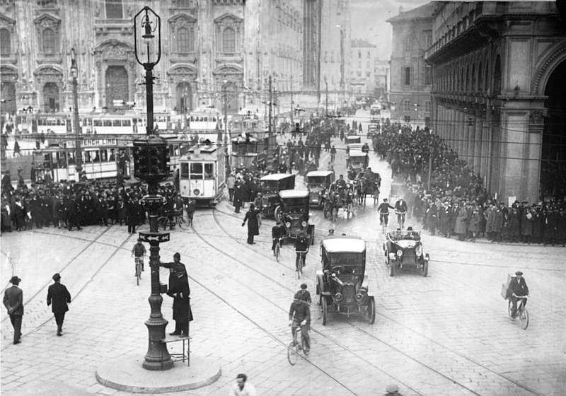 Verkehrregelung in Mailand nach Berliner System! Auf dem Domplatz in Mailand hat man zur Regelung des Strassenverkehrs Signallampen eingerichtet, welche nach dem Berliner System den Verkehr regeln. Information added by Wikimedia users.Semafori in Piazza Duomo a Milano, ca 1926. Sullo sfondo a destra, la "Manica lunga" di Palazzo Reale, demolita nel 1934 per costruire l'Arengario.